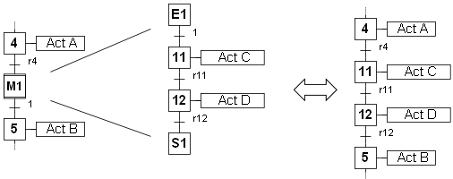 Présentation des macro-étapes pour le Grafcet